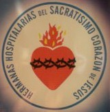 Emblema de les Germanes Hospitalàries del Sagrat Cor de Jesús